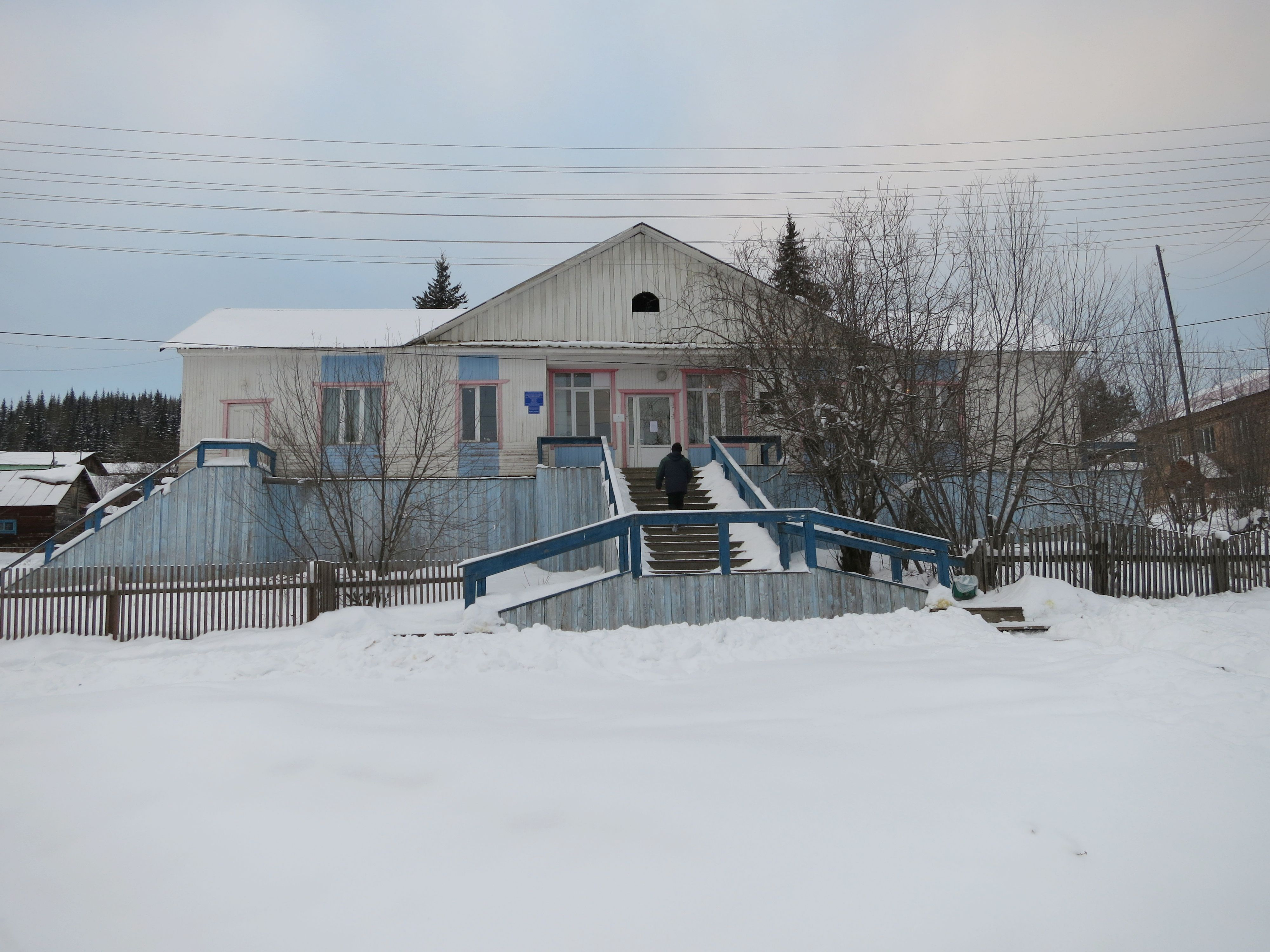 Байкит, здание почты